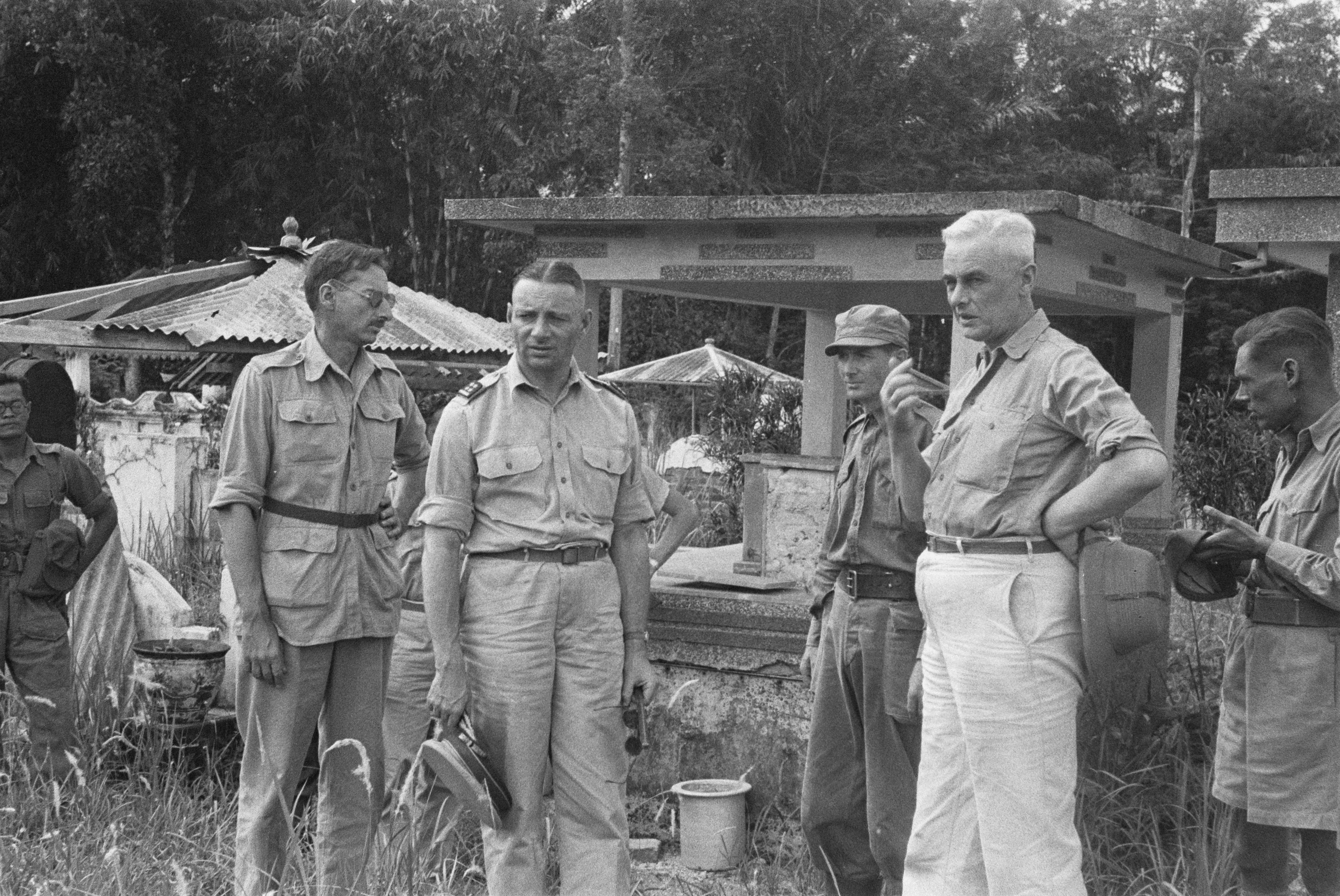 Collectie / Archief : Fotocollectie Dienst voor Legercontacten Indonesië Reportage / Serie : [DLC] Bezoek van generaal S.H. Spoor en luitenant-gouverneur-generaal H.J. van Mook aan de detachementen ten westen van Batavia Beschrijving : Begraafplaats Depok. Vlnr. W.F.M. graaf van Bylandt, generaal S.H. Spoor, F.M. baron van Asbeck Datum : 6 juni 1946 Locatie : Indonesië, Nederlands-Indië Fotograaf : Fotograaf Onbekend / DLC Auteursrechthebbende : Nationaal Archief Materiaalsoort : Negatief (zwart/wit) Nummer archiefinventaris : bekijk toegang 2.24.04.03 Bestanddeelnummer : 7-2-3